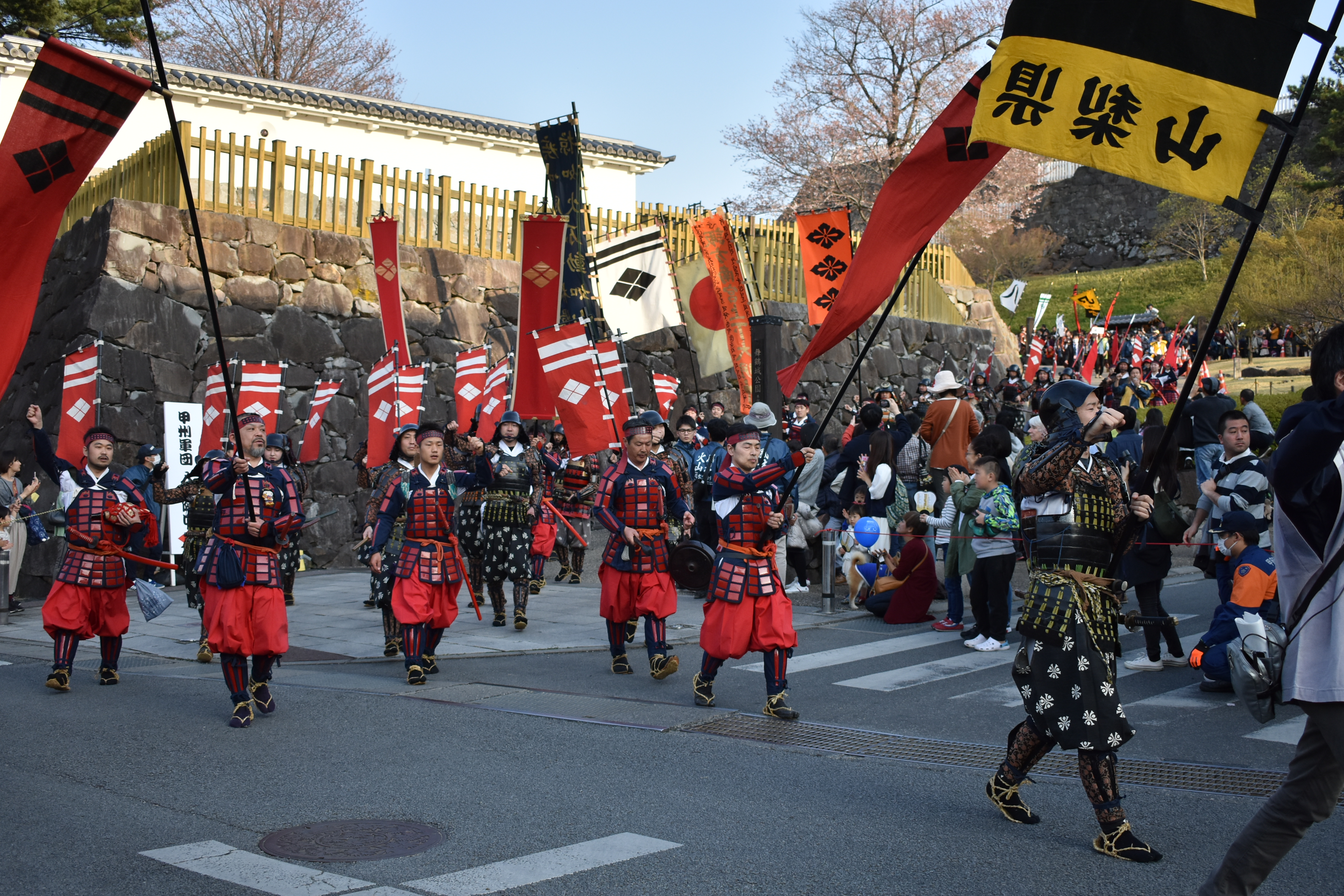 信玄公祭り 甲州軍団出陣 Nikon D3400